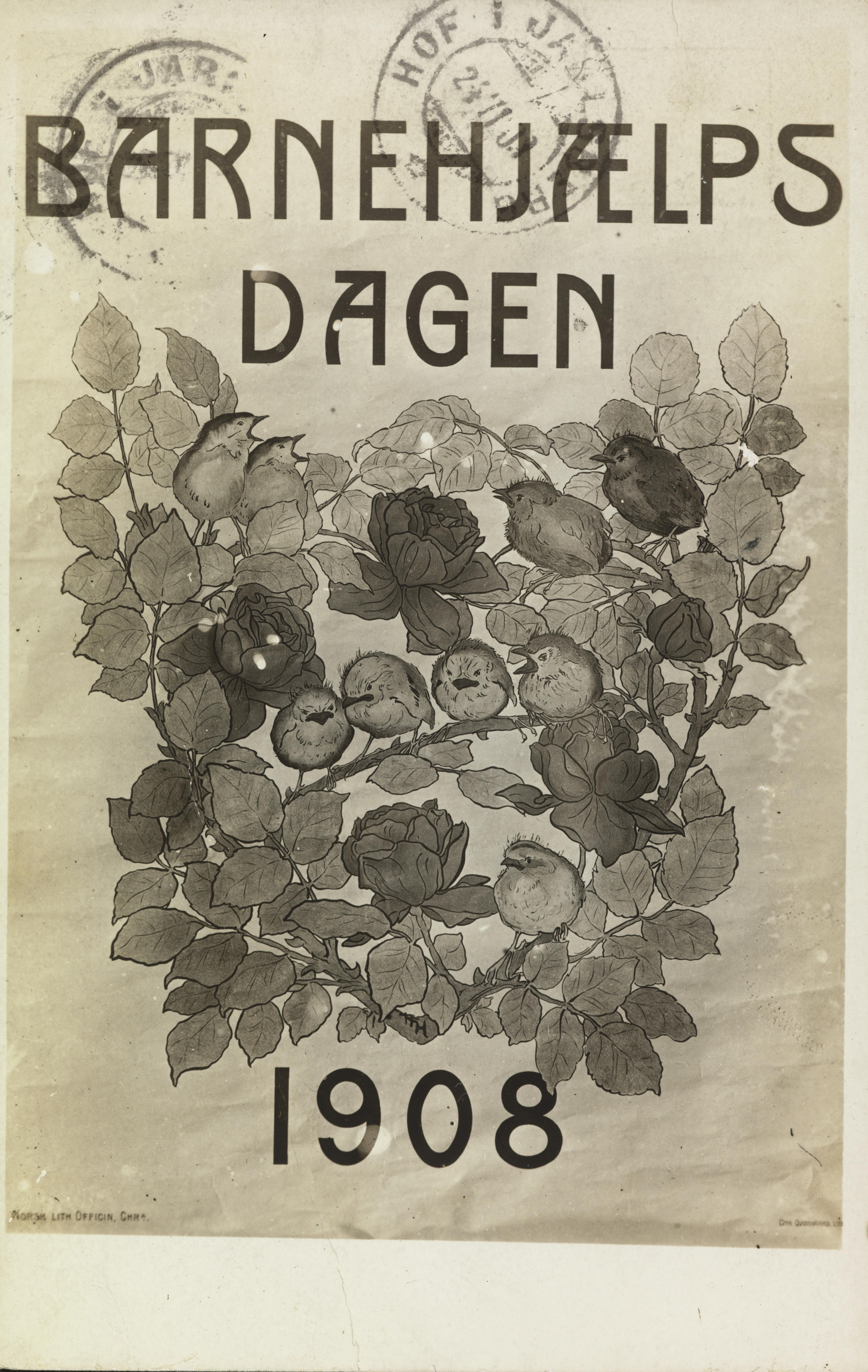 Bildet er hentet fra Nasjonalbibliotekets bildesamling